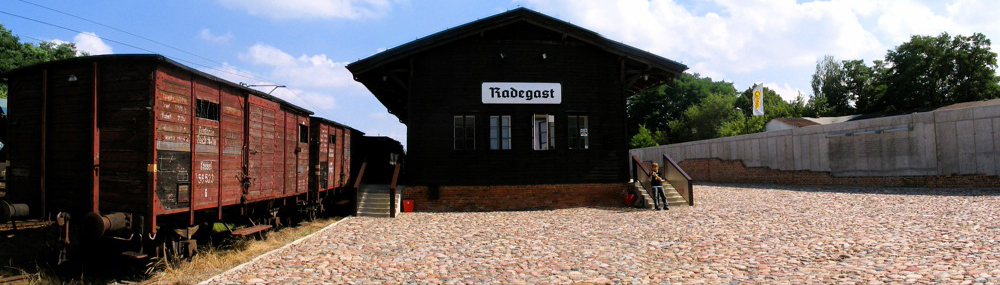 Stacja Radegast w Łodzi